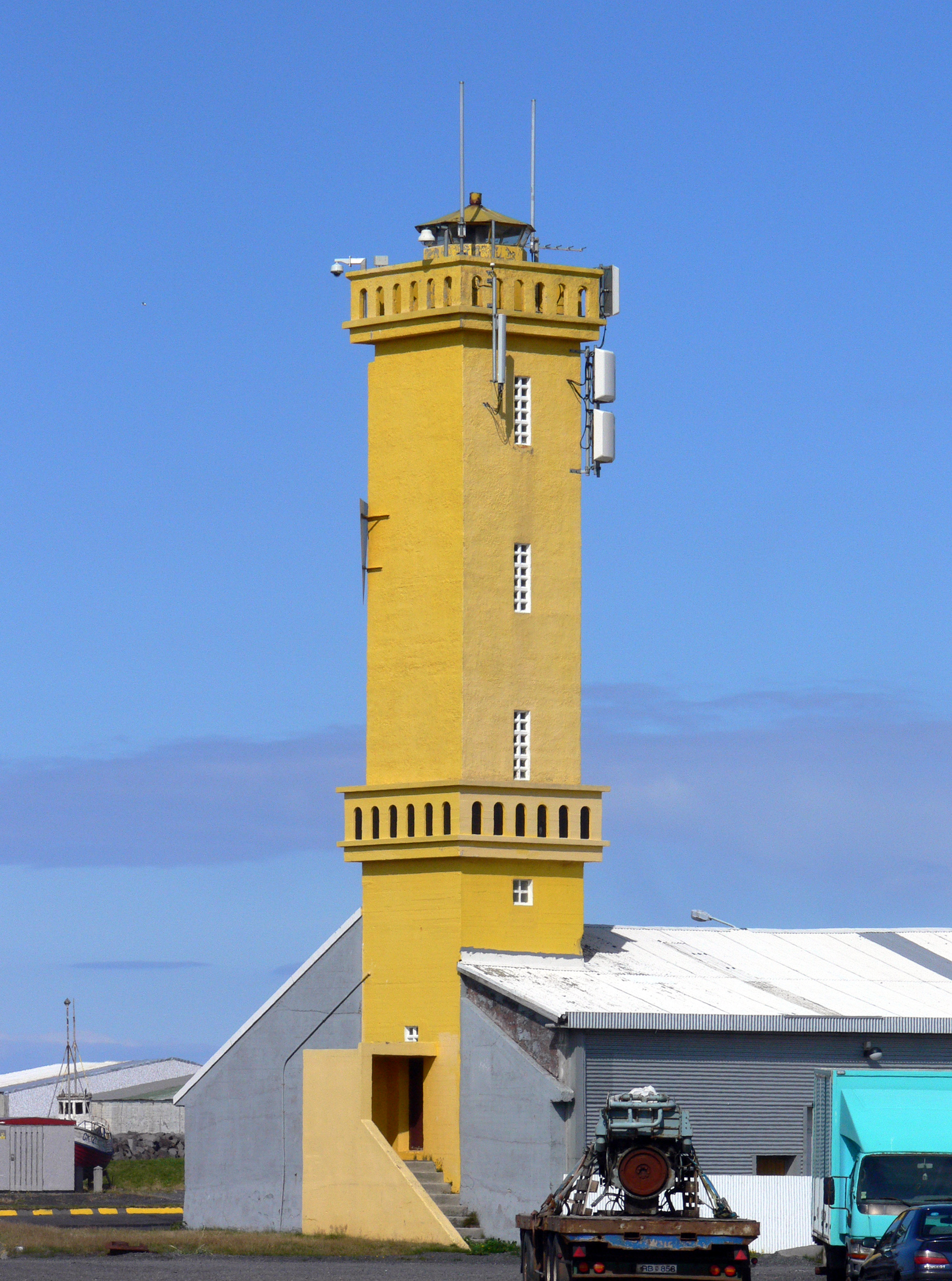 Leuchtturm am Hafen von Sandgerði auf Reykjanes.